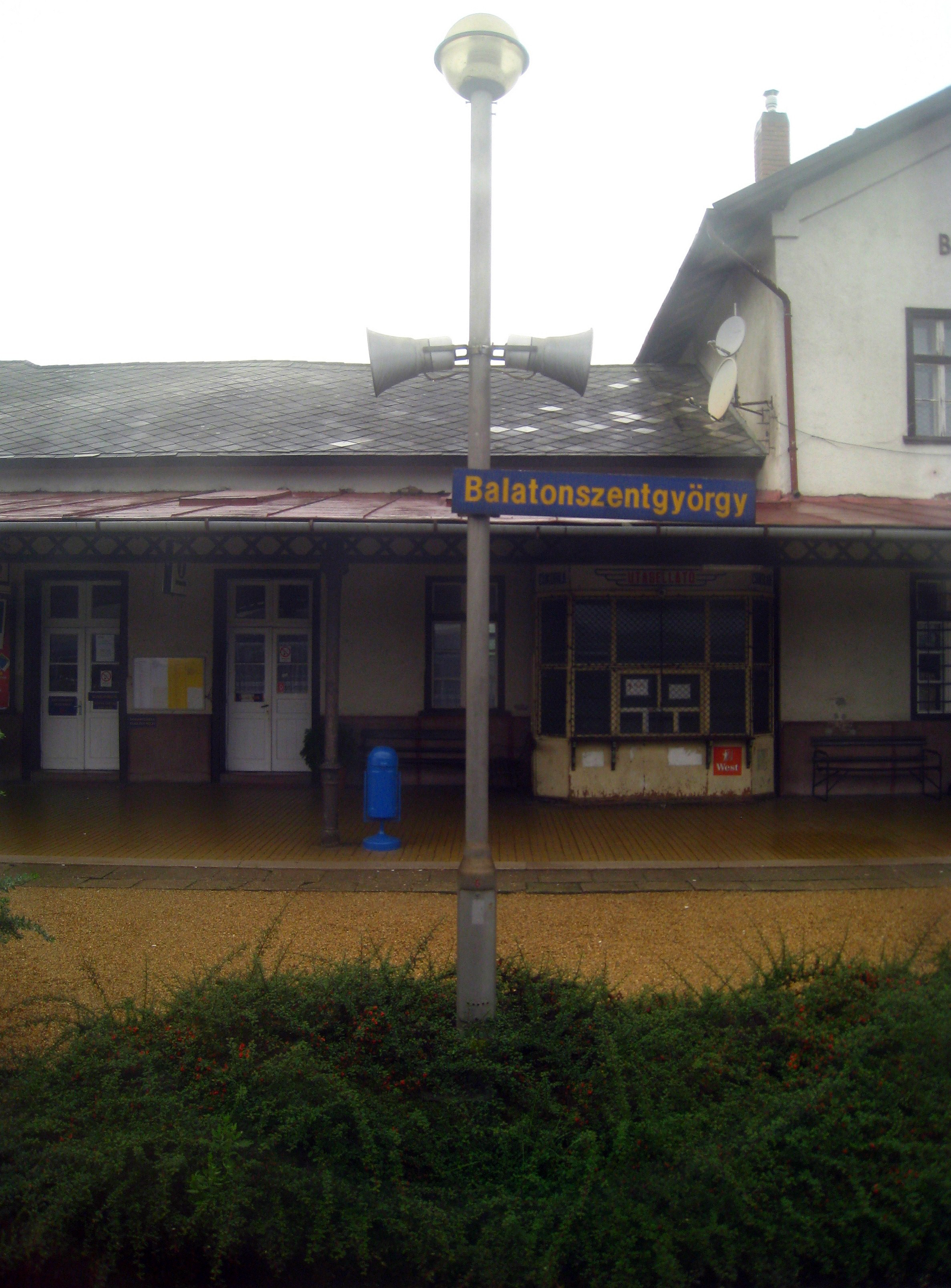 Balatonszentgyörgy pályaudvar.